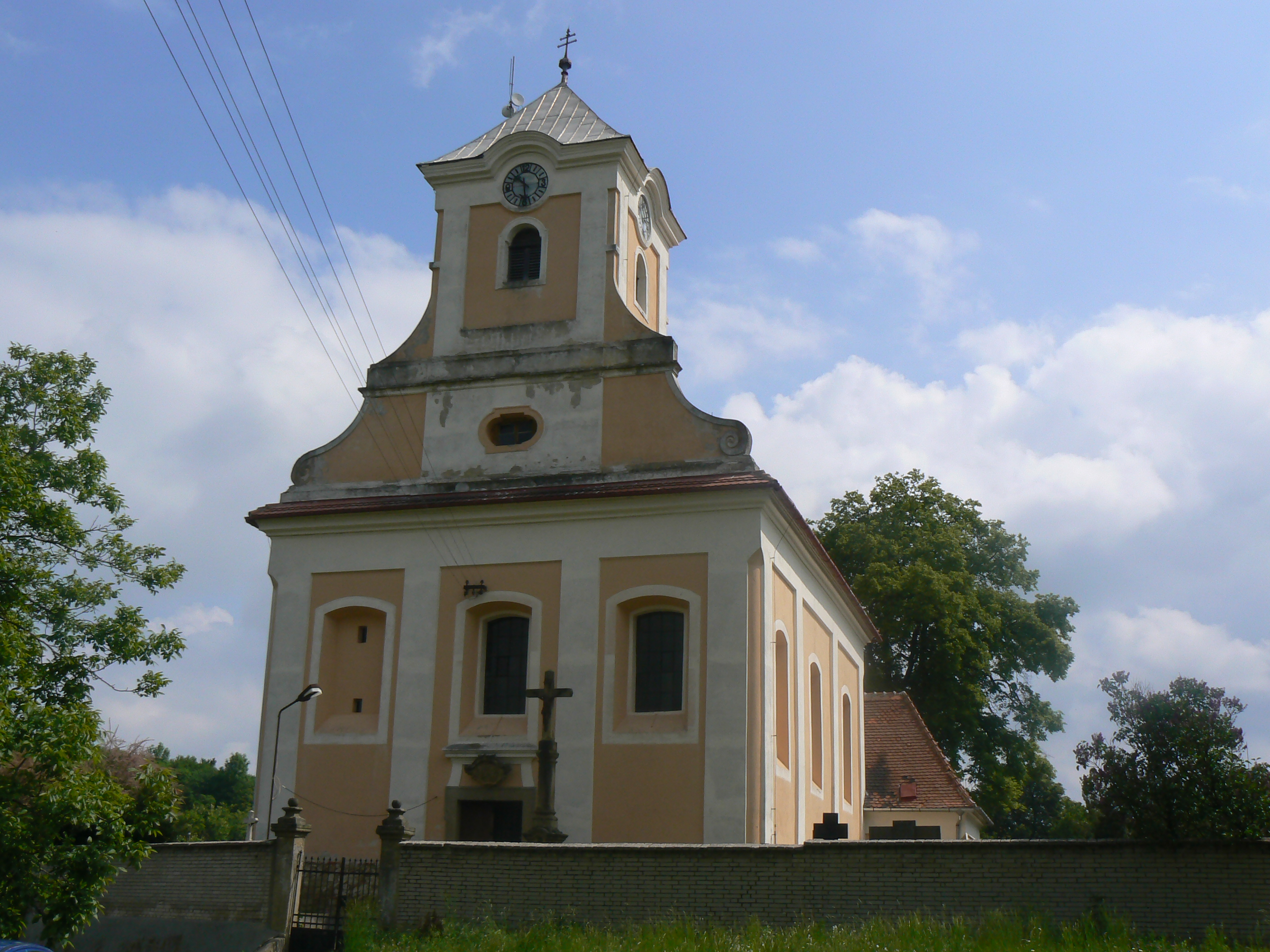 Kostel sv. Anny v Jestřabicích